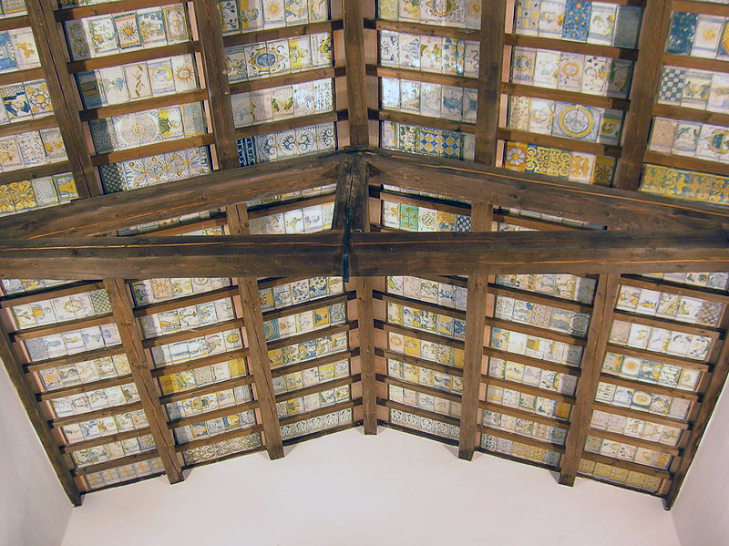 interno della Chiesa di San Donato di Castelli (Teramo): soffitto maiolicato. Per Carlo Levi è la Cappella Sistina della maiolica